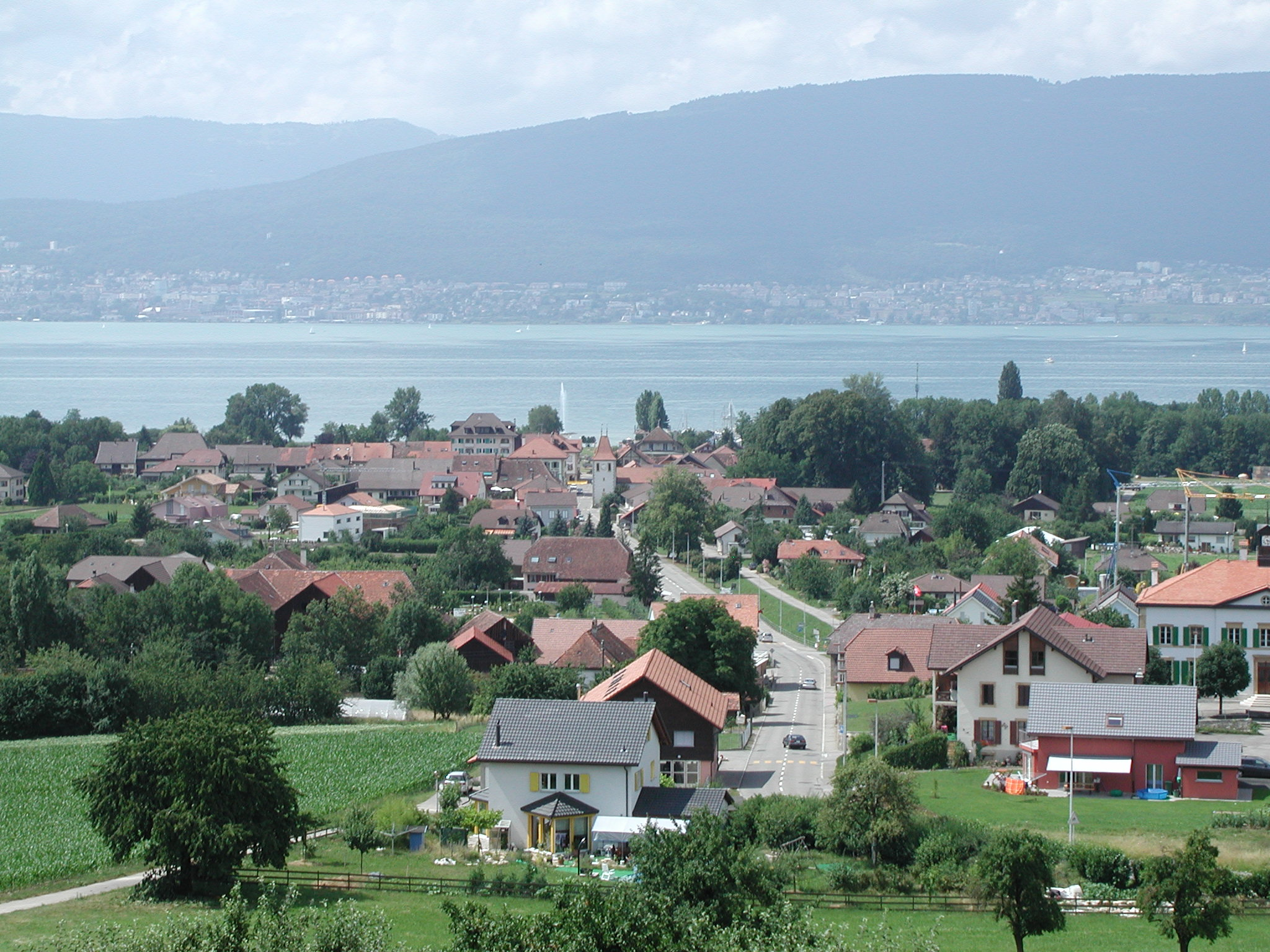 Cudrefin (VD), Suisse; Vue depuis l'église de Montet-Cudrefin